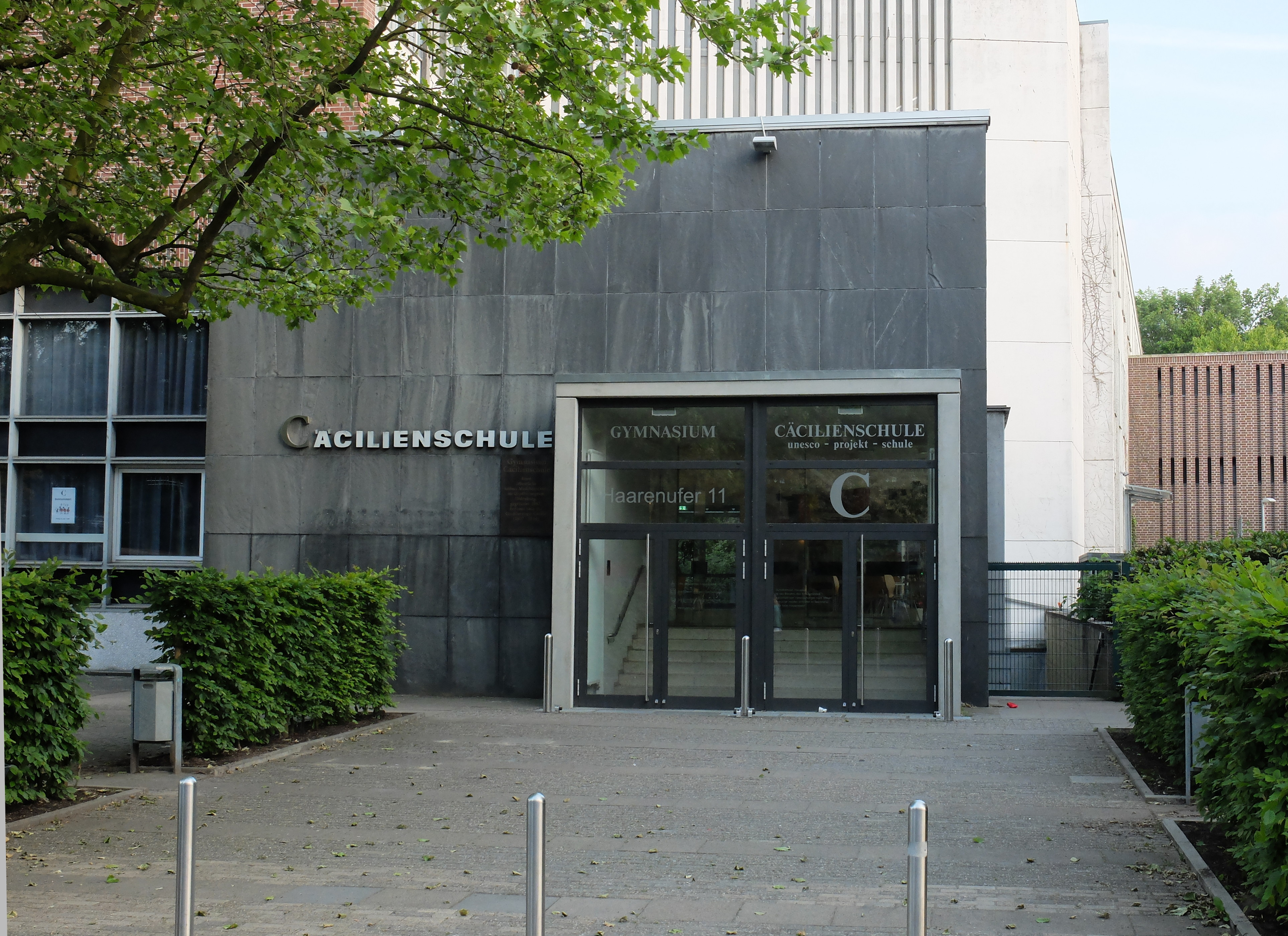 Eingang der Cäcilienschule Oldenburg